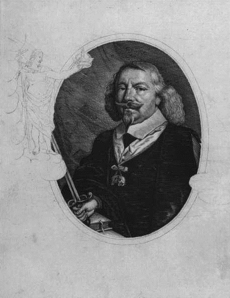 Gregers Krabbe